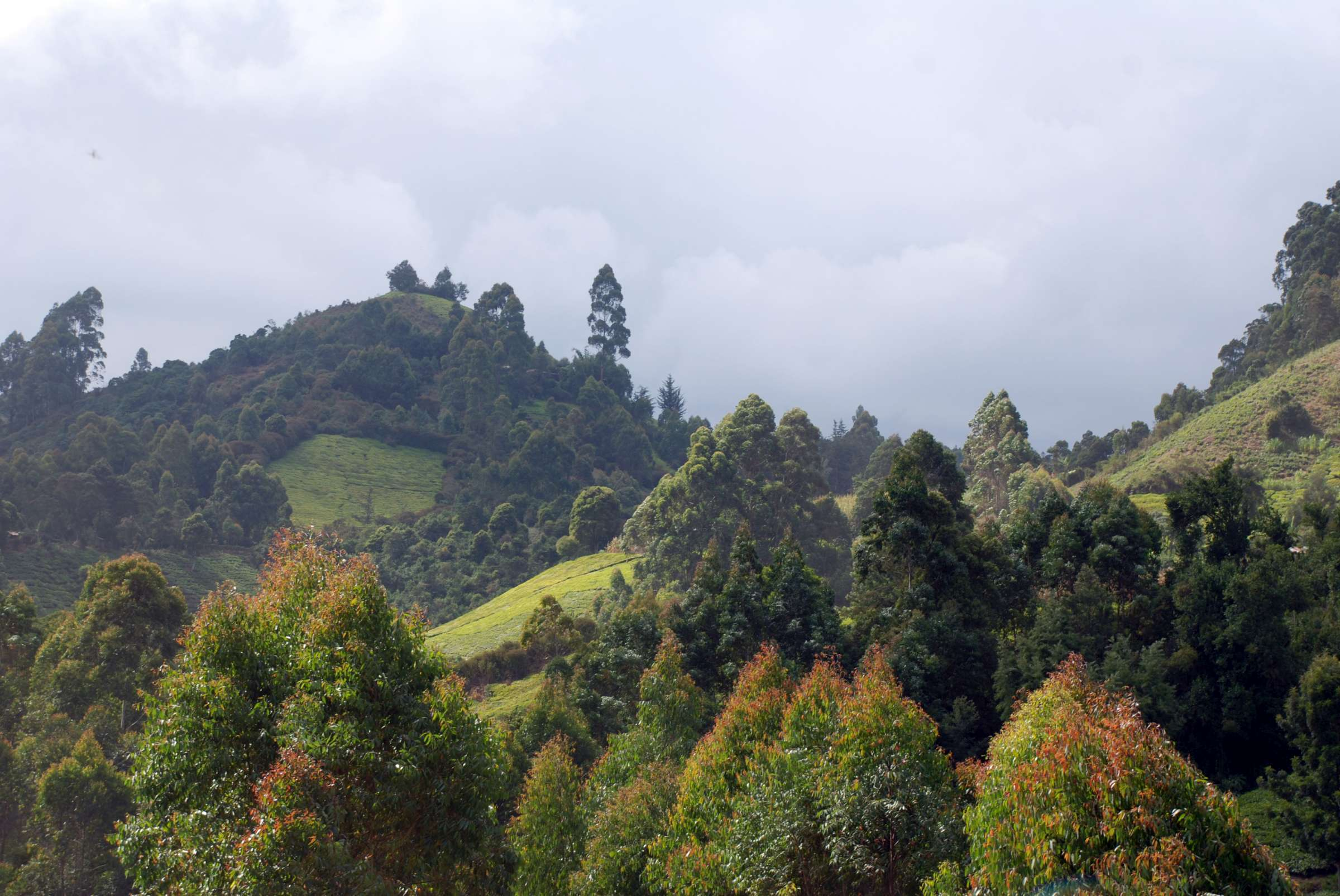 Murang'a